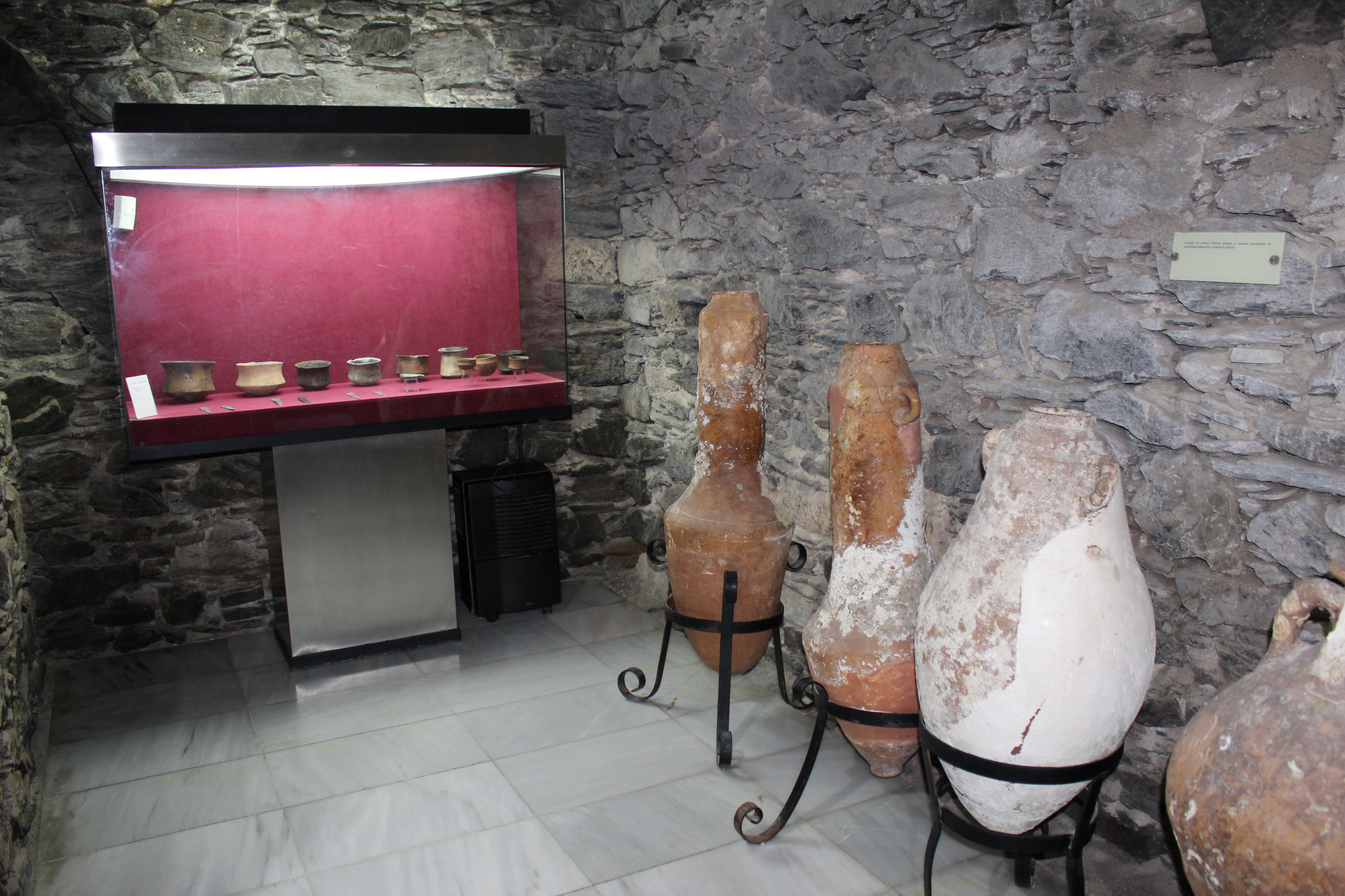 Arqueología submarina. Ánforas fenicias, púnicas y romanas.